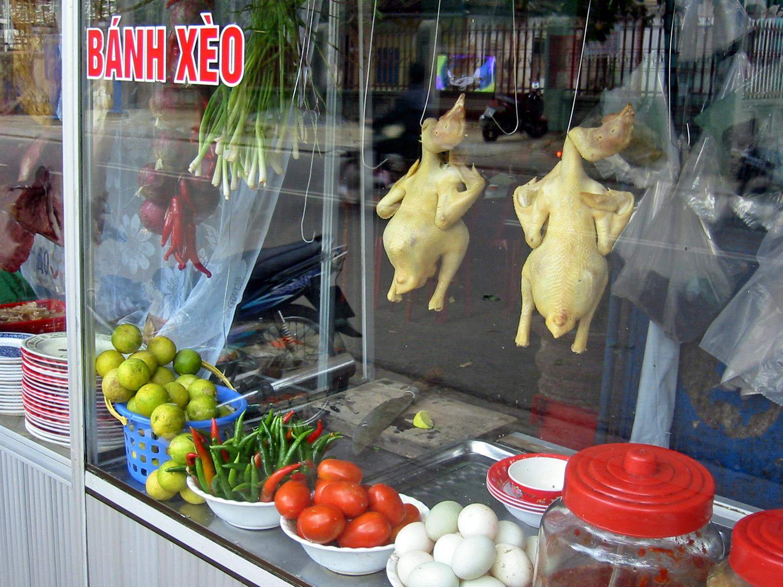 Cookshop in Da Nang, Vietnam